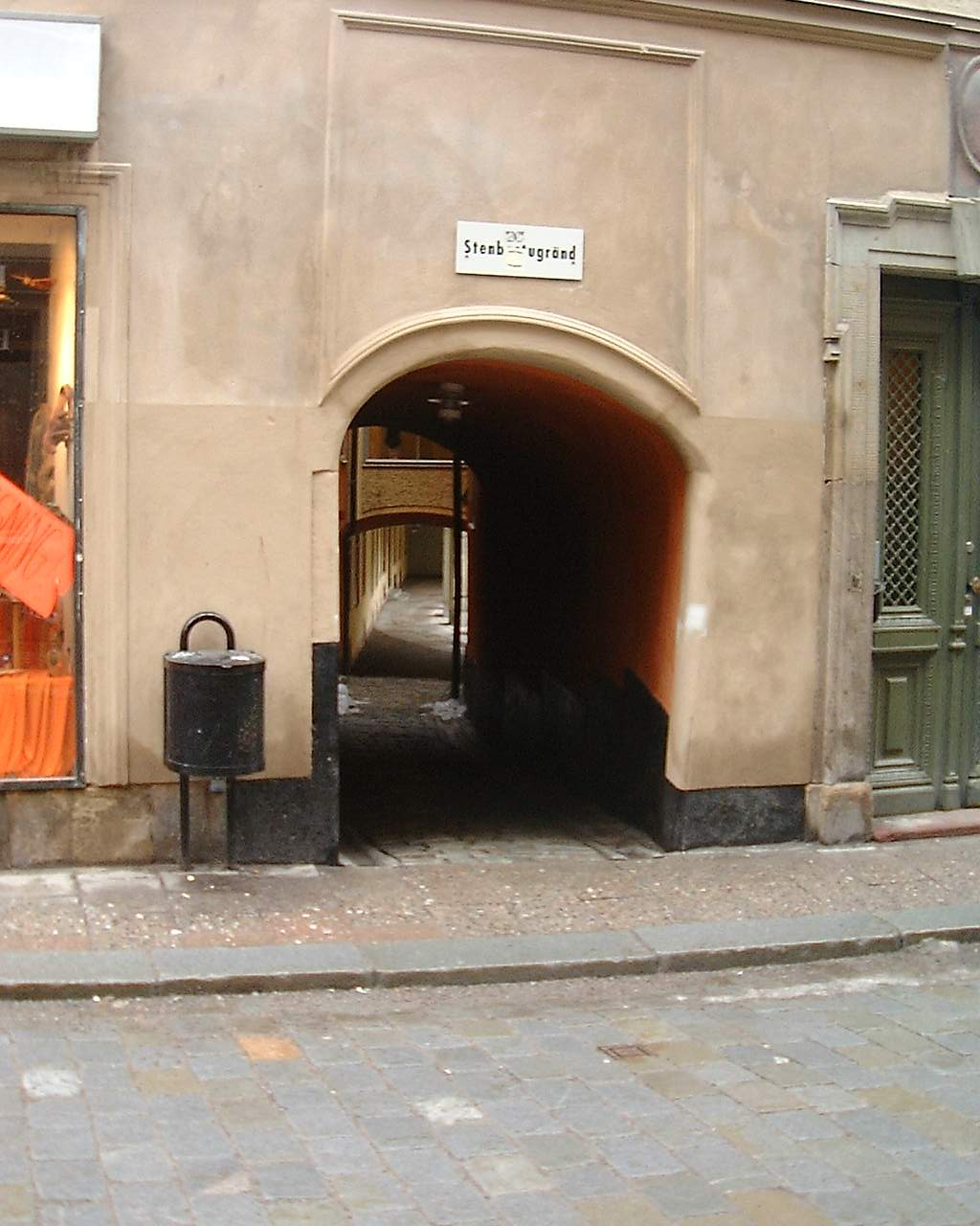 Stenbastugränd, Gamla stan, Stockholm